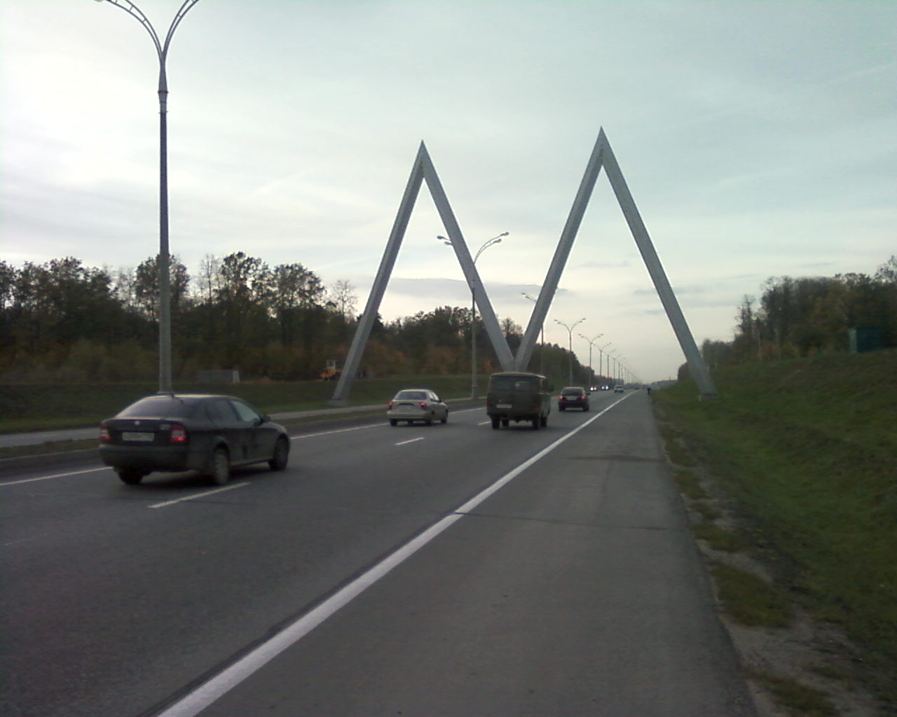 Перед въездом в Казань//Before arriving in Kazan